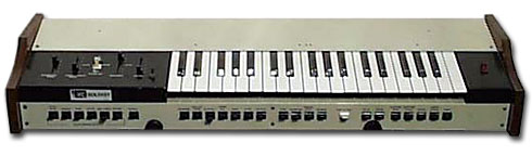 sintetizzatore ARP Soloist Licensing Categoria:Sintetizzatori Categoria:Sintetizzatori ARP